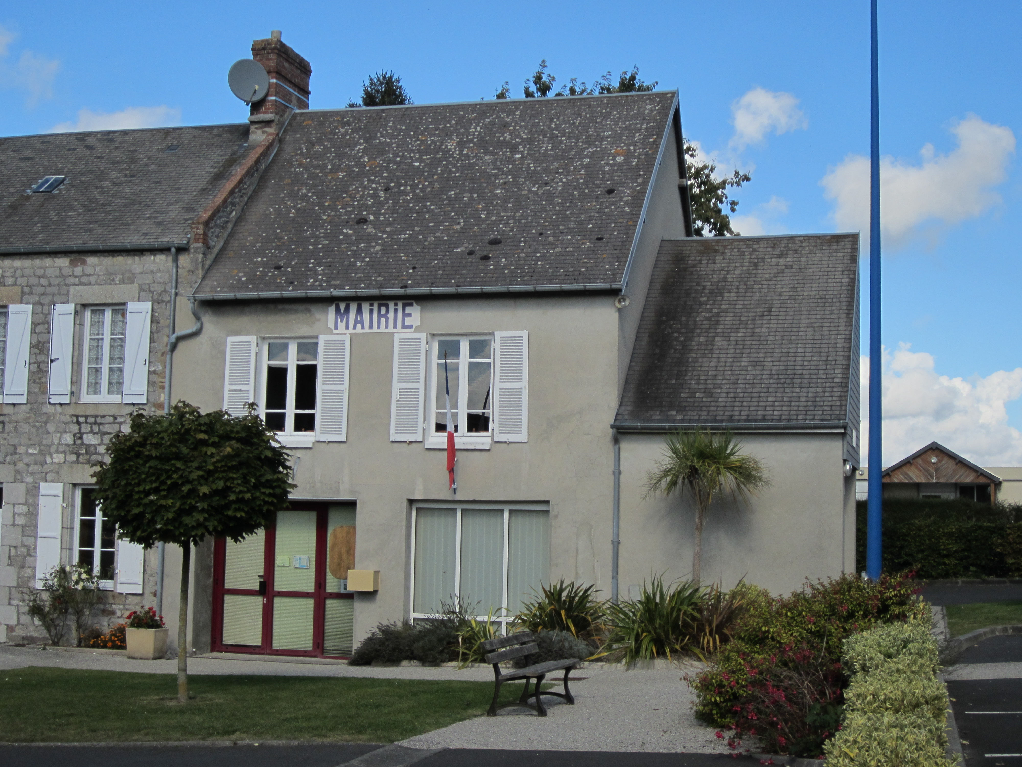 Muneville-sur-Mer, Manche